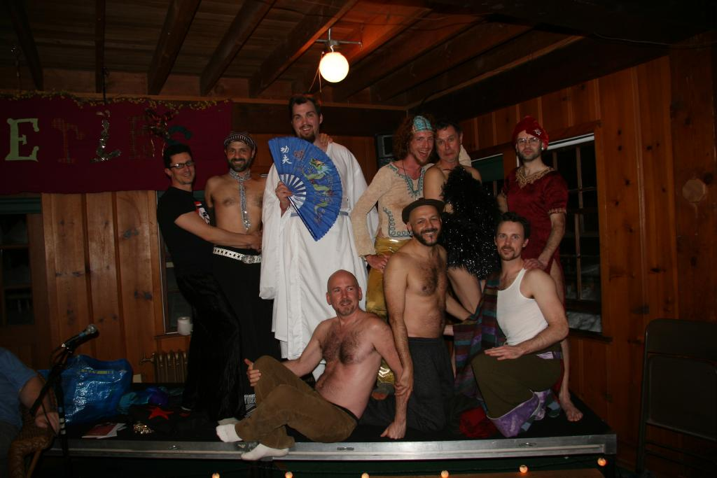 Breitenbush in Winter